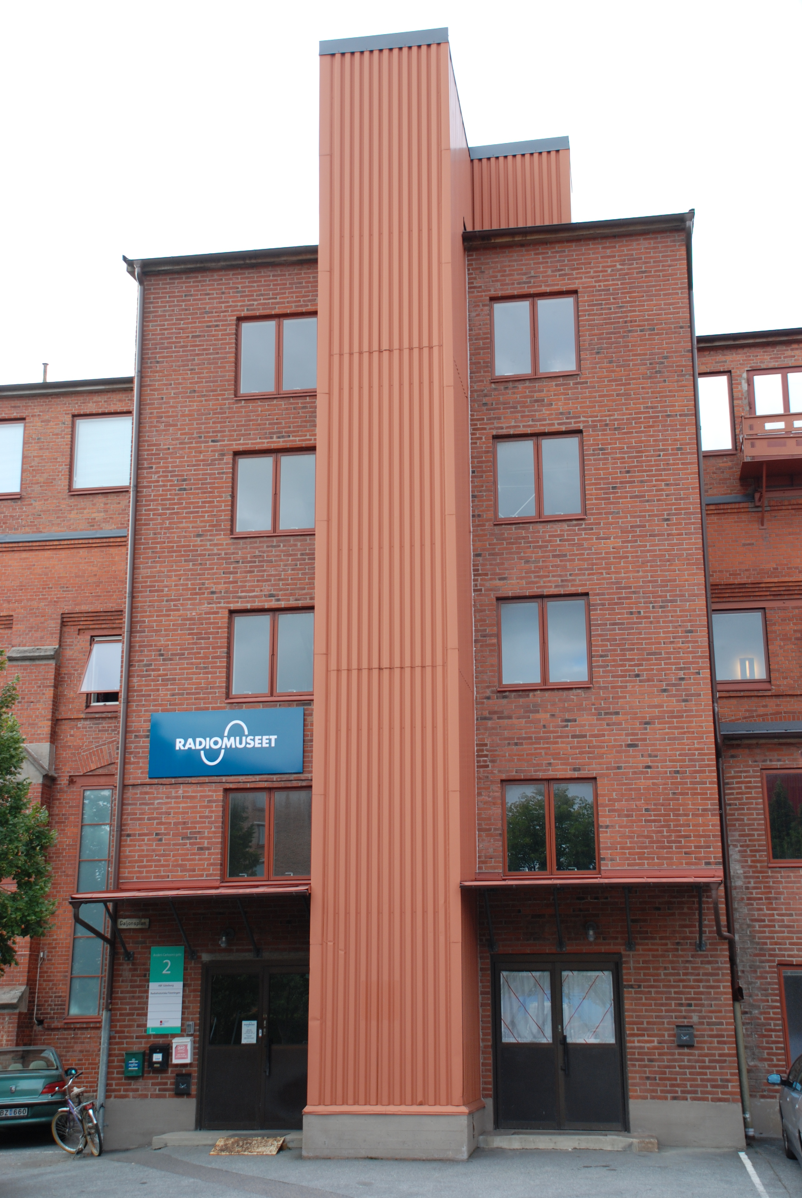 Radiomuseet på Anders Carlssons Gata i stadsdelen Lundbyvassen i Göteborg.